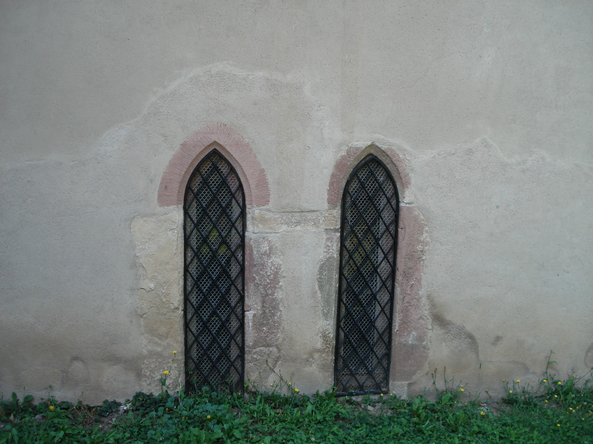 Wattwiller Eglise Fenêtre géminée gothique vue de l'extérieur Wattwiller Kirche Paariges gotisches Fenster Aussenanblick